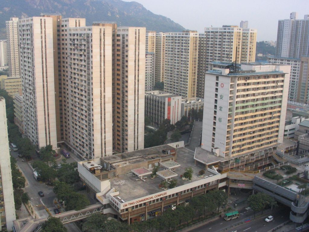 安定邨(On Ting Estate)